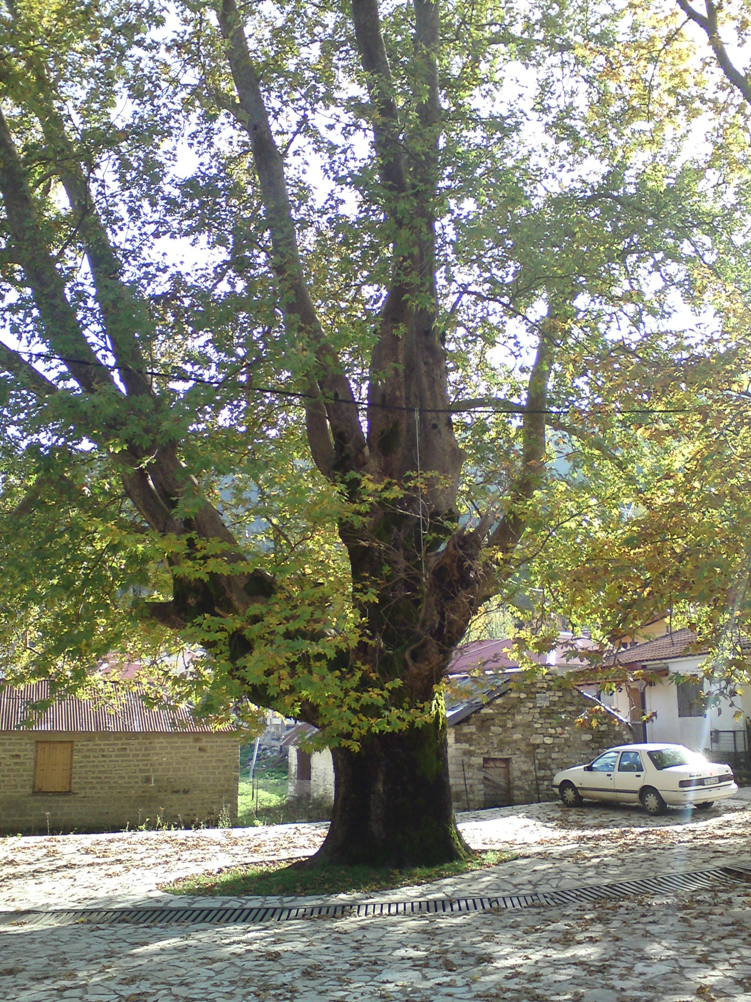 Ο πλάτανος στην κεντρική πλατεία του χωριού Τροβάτο στο νομό Ευρυτανίας